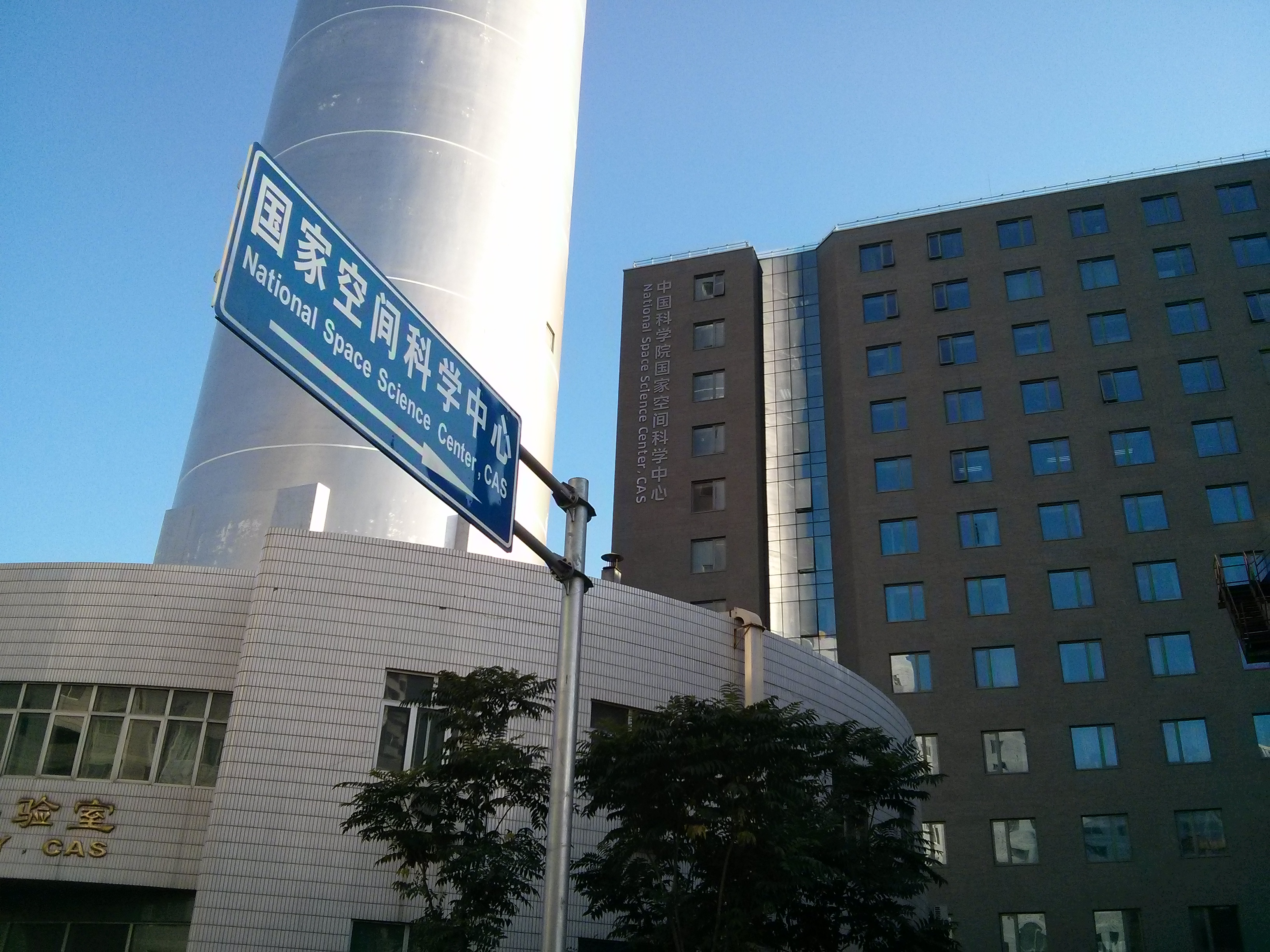 空间中心北门